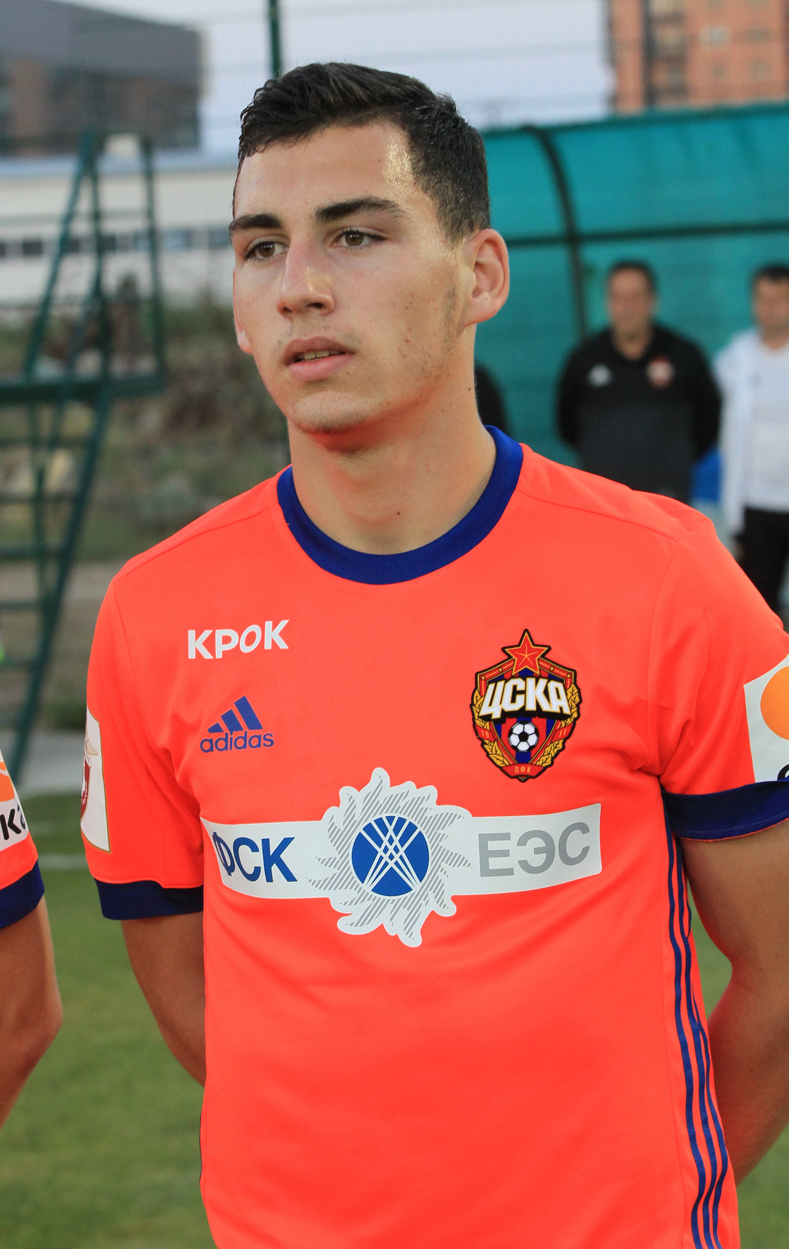 Наир Тикнизян перед матчем молодежных составов Анжи и ПФК ЦСКА в Махачкале 14 июля 2017 года.